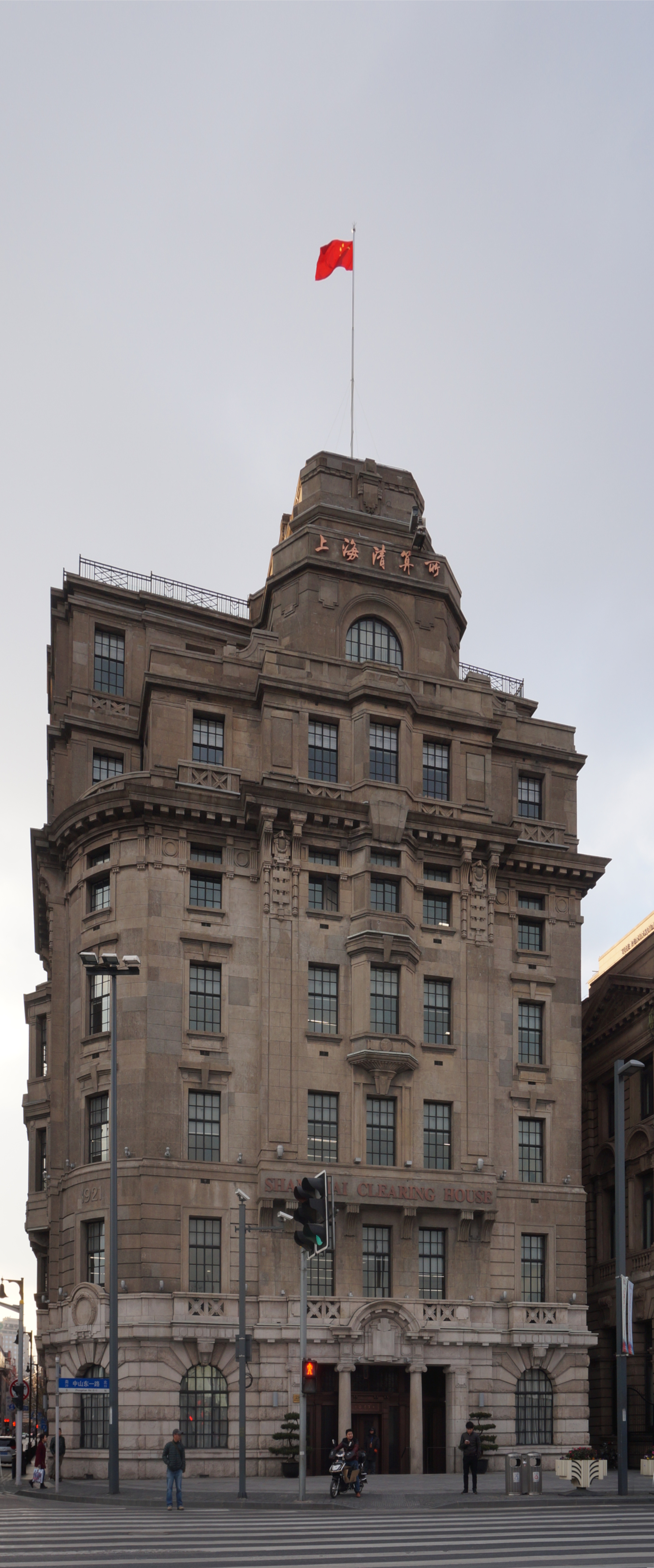 中文（中国大陆）: 外滩格林邮船大楼